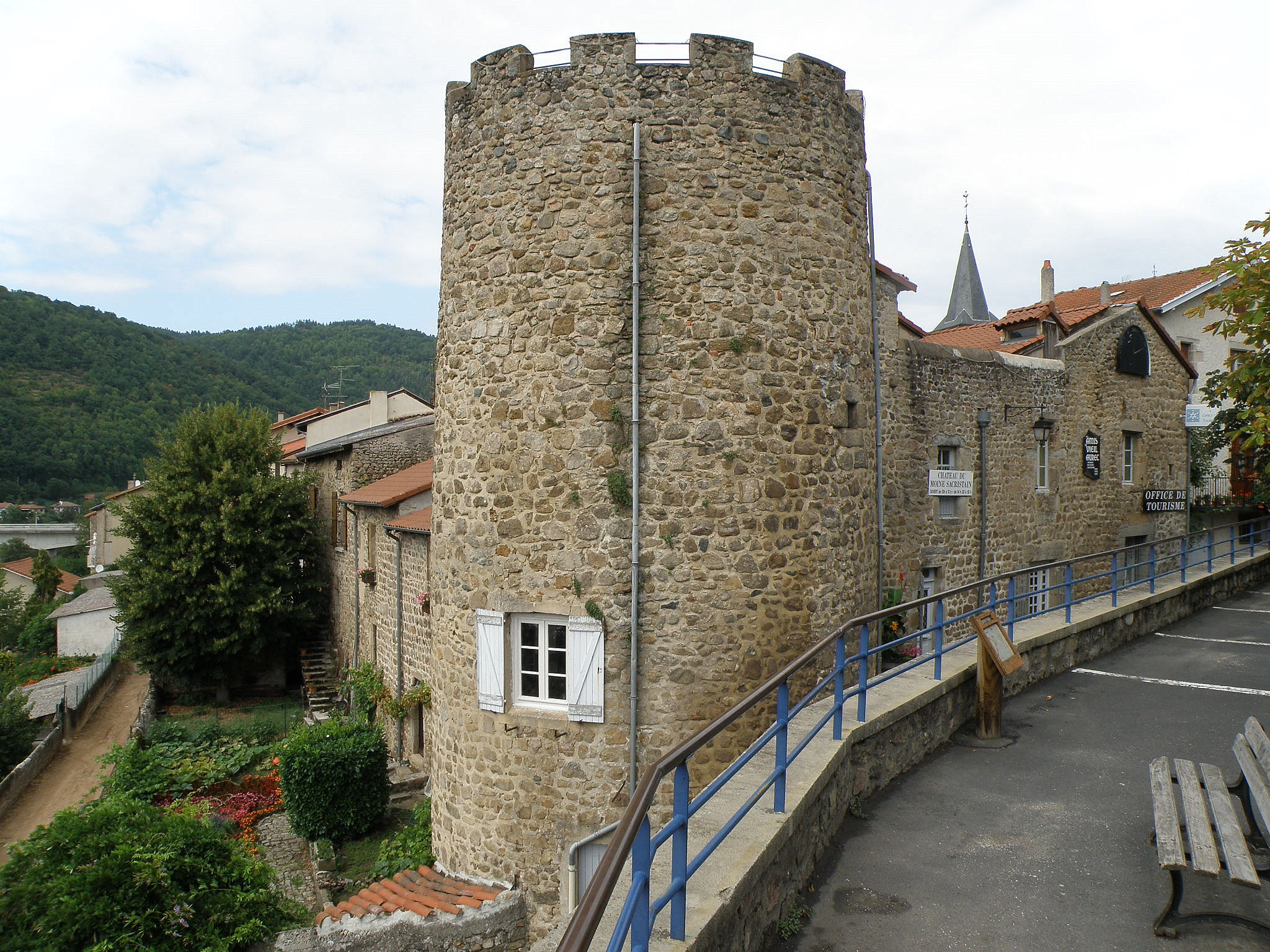 Aurec-sur-Loire, dép. de la Haute-Loire, France (région Auvergne). Château du moine sacristain.